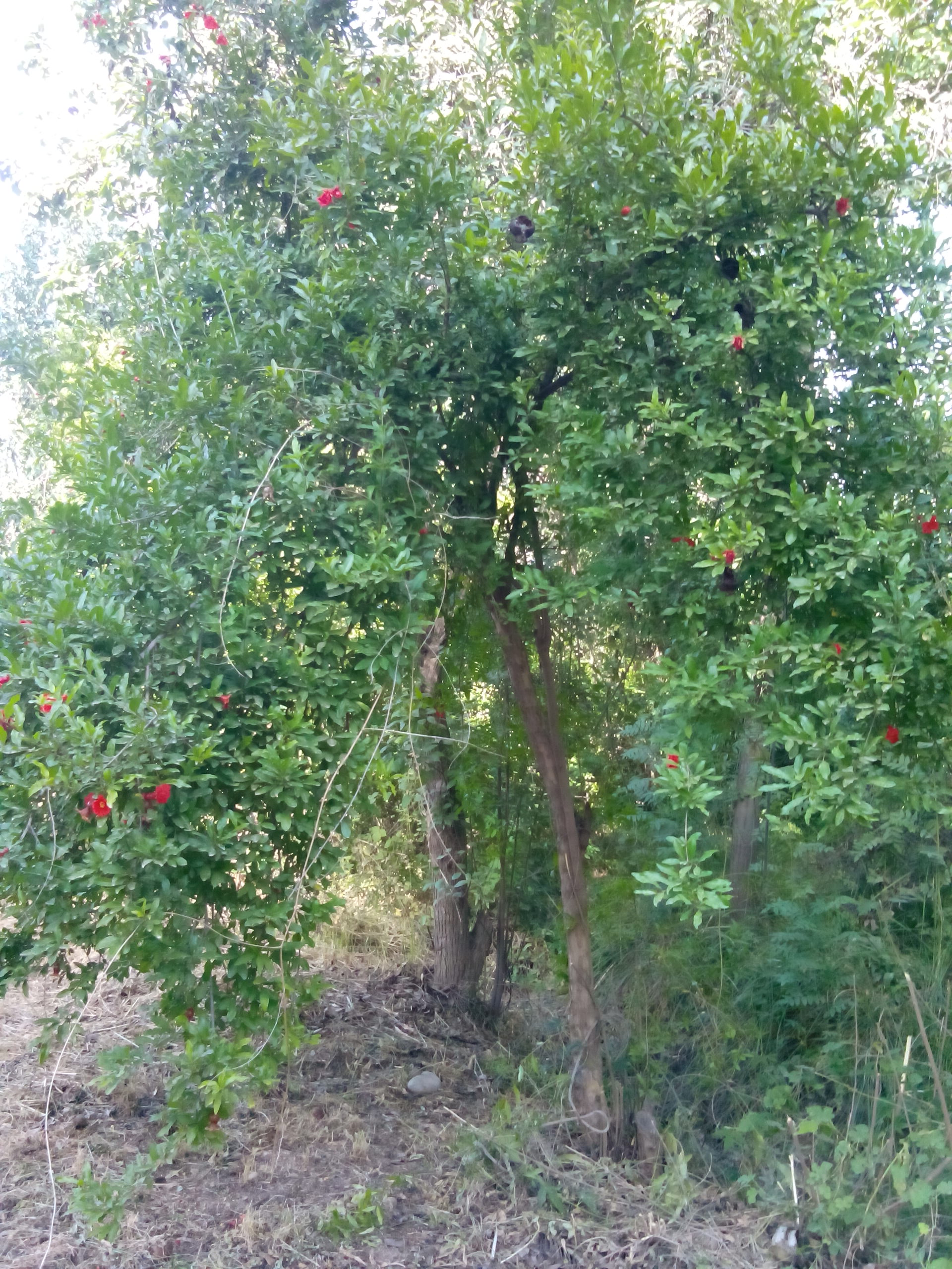 شجرة رمان في بستان نخيل بقرية تابعة لمدينة الخالص شرق العراق